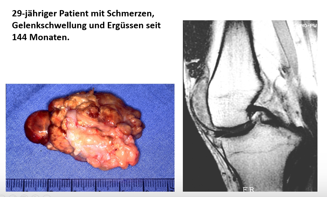 Nodulaere PVS des Kniegelenkes